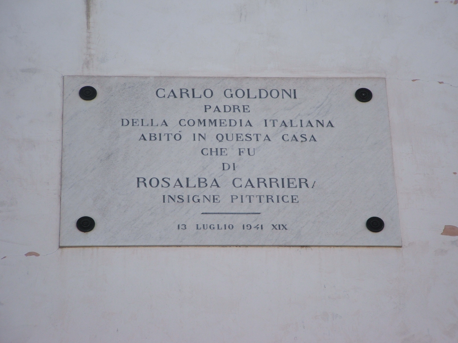 Chioggia, laguna veneta